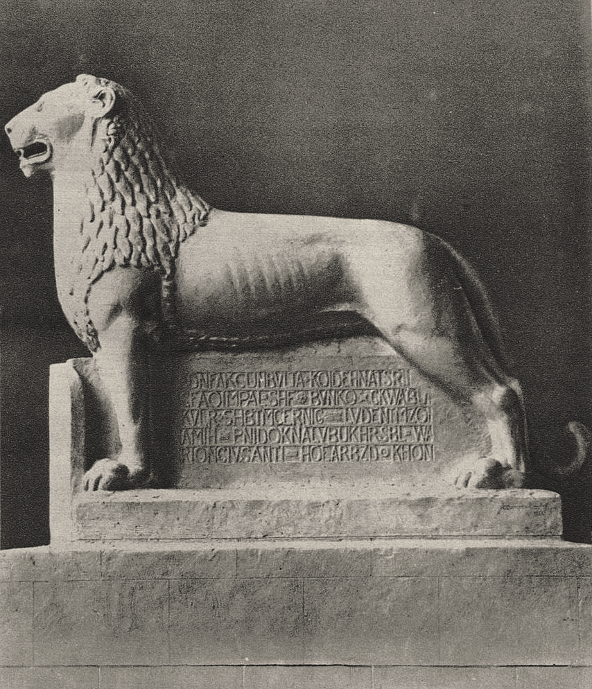 Der Bergische Löwe, das Düsseldorfer Kriegswahrzeichen, nach seiner Vollendung. Das Wahrzeichen soll Anfang Januar auf dem südlichen Rundplatz der Königsallee seiner Bestimmung übergeben werden. Foto Julius Söhn